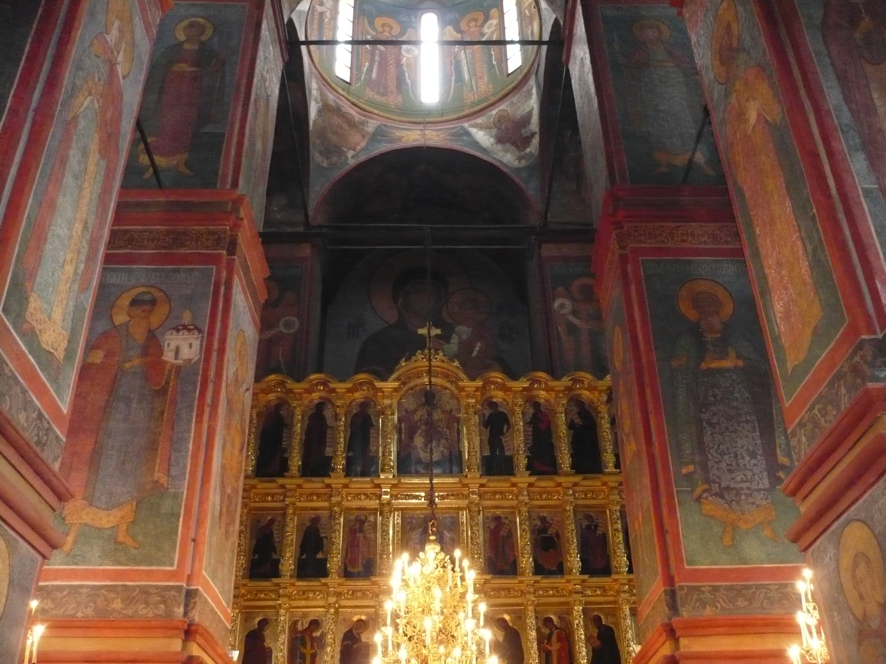 Новодевичий женский монастырь (в Смоленском соборе)